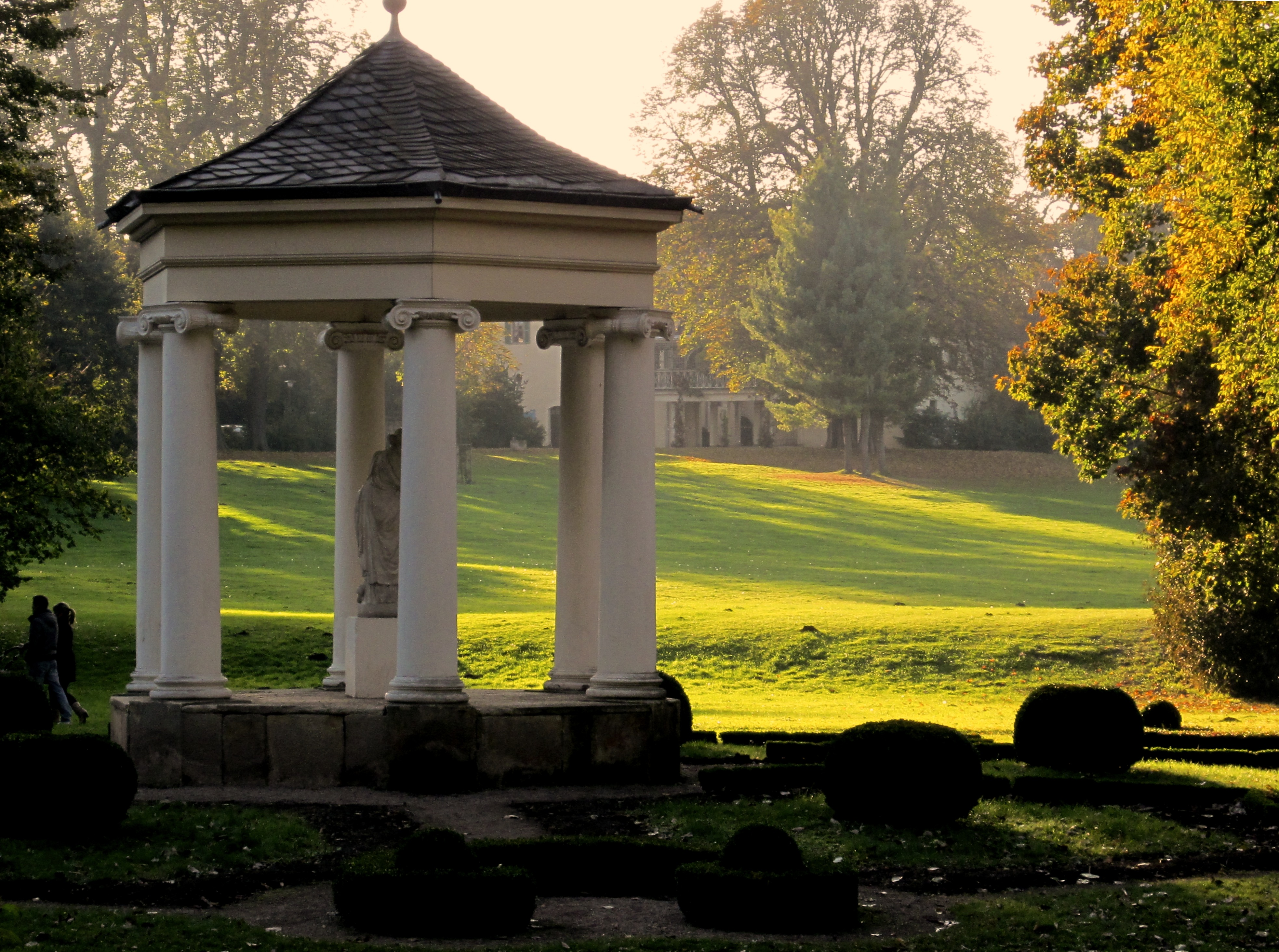 Musentempel, 1803 am Ilmbogen im Tiefurter Park mit Polyhymnia von Klauer, Tiefurter Park wurde 1776-80 von J.L. von Knebel angelegt und unter Anna-Amalia 1782-88 erweitert, 1848 von Eduard Petzold nach Plänen von Fürst von Pückler-Muskau zu engl. Landschaftspark umgestaltet, im Hintergrund Schloss Tiefurt